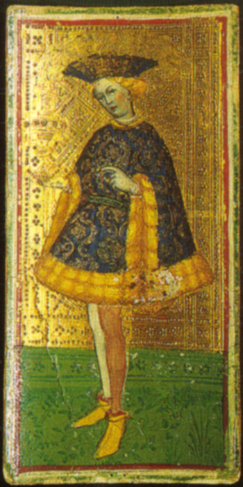 Fante di coppe